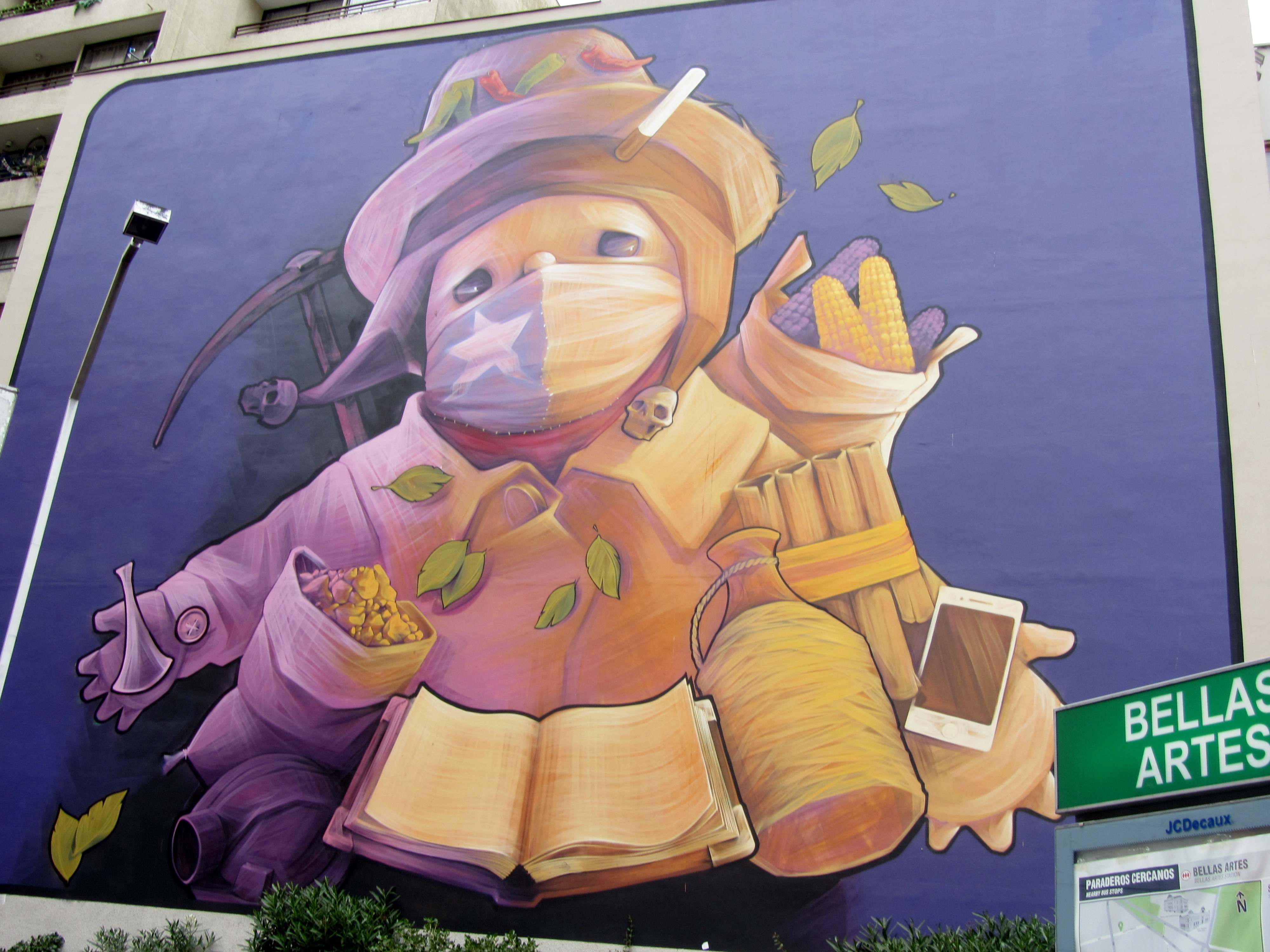 Mural Ekeko de Inti a la entrada del metro Bellas Artes, calle Mosquetos con Monjitas. Este, en el muro oriente, junto con la Ekeka de la pared norte, fueron pintados en diciembre de 2013, durante la segunda edición del festival de intervenciones urbanas Hecho en Casa, sobre los que había desde 2009 hechos por chilenos de acuerdo a diseños de la española Ágatha Ruiz de la Prada. En abril de 2018 fueron reemplazados, en el marco del festival urbano Barrio Arte, por uno de Inti, en la pared norte, que representa una Virgen con un becerro en los brazos, y en el muro oriente, por uno de Mono González con tres rostros rodeados de ramas.